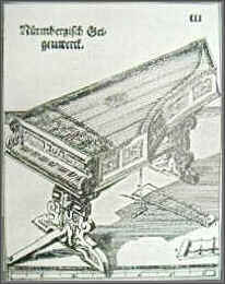 Nürnbergisches Geigenwerk nach Praetorius